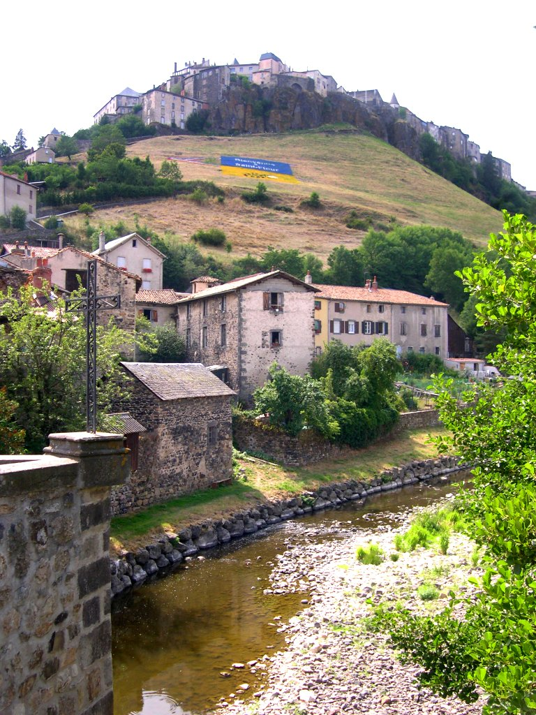 Vue de la ville de Saint Flour (Cantal, France).